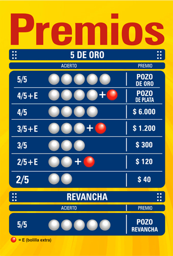 Estos son los premios para el 5 de Oro en Uruguay.